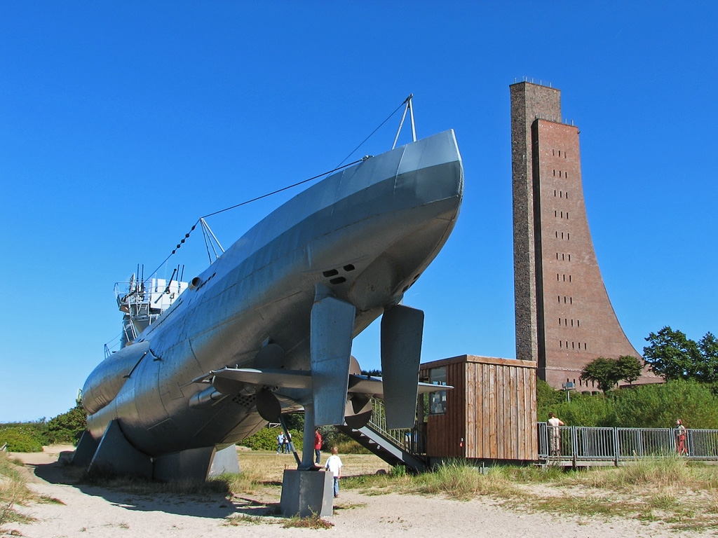 Beschreibung: U 995 links & Marineehrenmal Laboe rechts Fotograf: Darkone, 3. September 2005